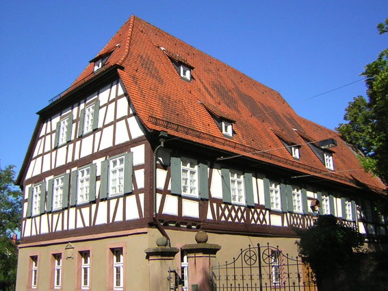 Ehemalige Amtskellerei in Buchen, Odenwald. Gedenkstätte für den Komponisten Joseph Martin Kraus